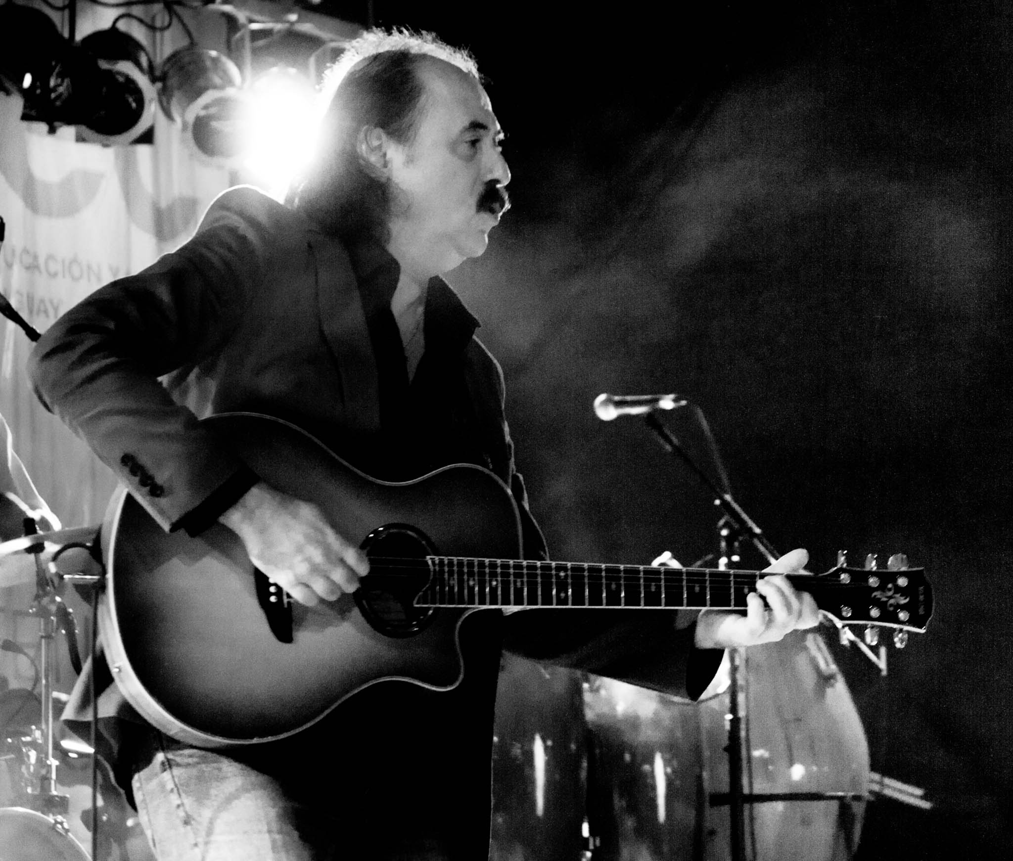 Jaime Roos en 2011.